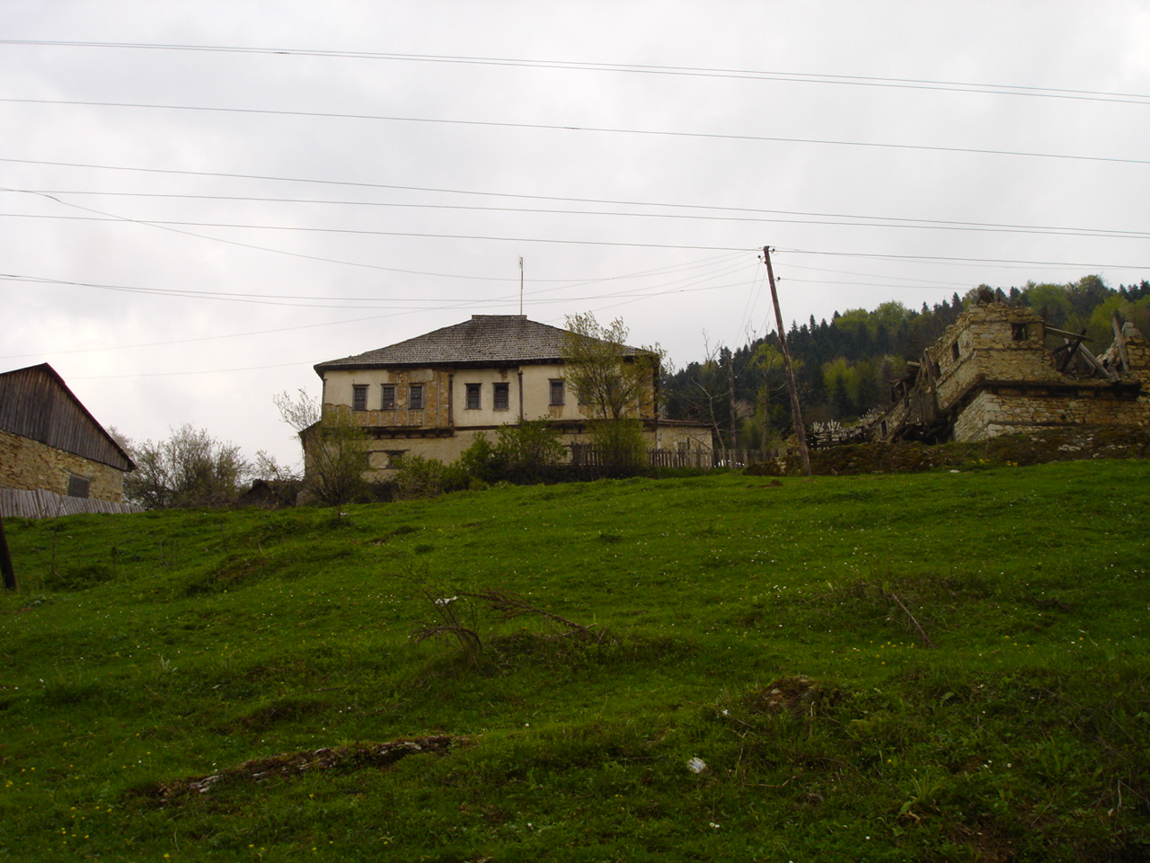 Поглед от долната махала към горните къщи на село Вълковия, Република Македония.